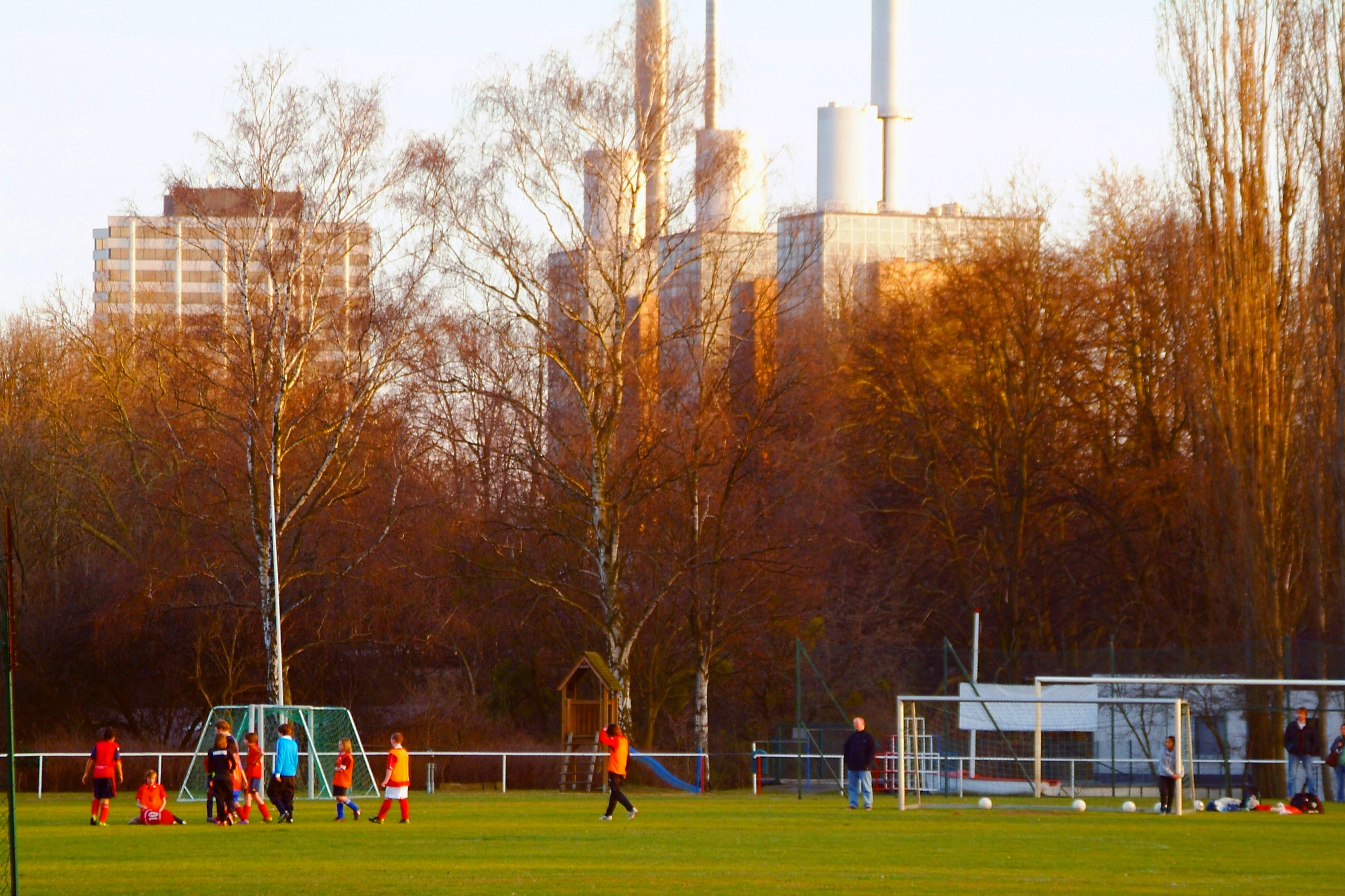 Spätwinter-Abendstimmung während einer betreuten ko-edukativen Fußball-Übung der Jugend auf dem Gelände des Vereins für Leibesübungen von 1848 Hannover. Im Hintergrund das Ihmezentrum und das Heizkraftwerk am Küchengarten.